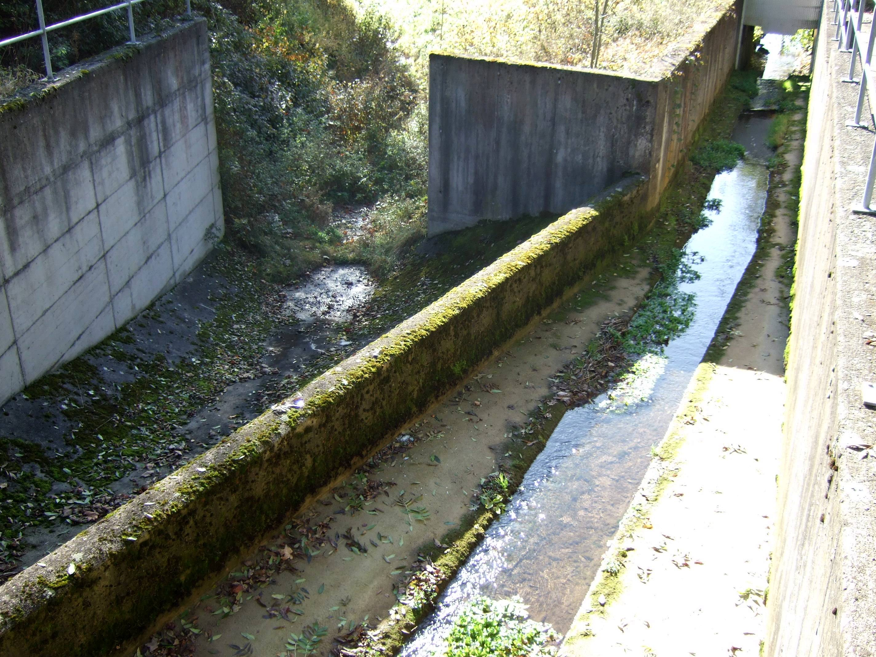 Die Flussbifurkation des Mühlegraben bei Blumberg. Die Aitrach (links) ist fast trocken und fließt zur Donau, während das restliche Wasser zum Schleifebächle (rechts) über die Wutach zum Rhein fließt.